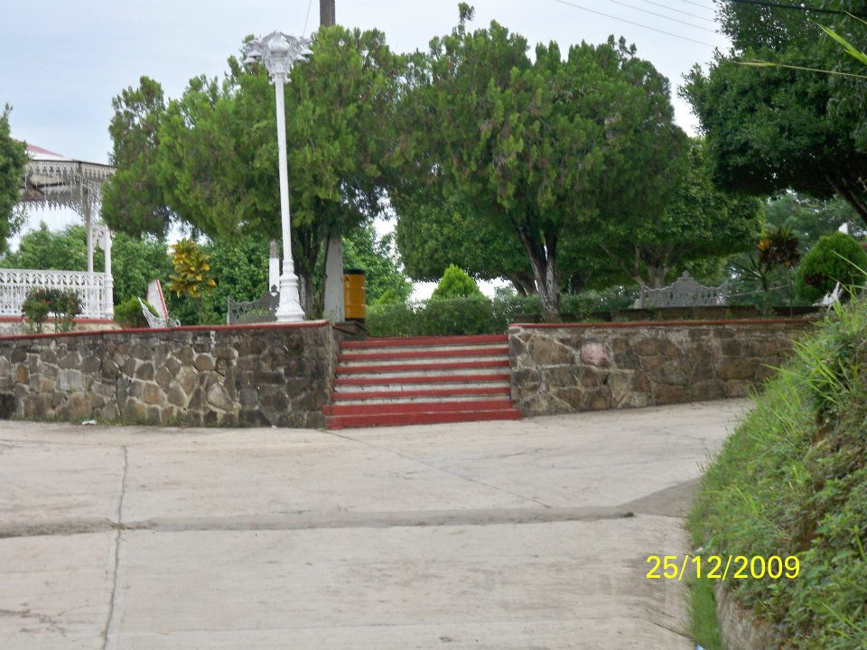 Entrada al parque de Huichapa que está alrededor del kiosko